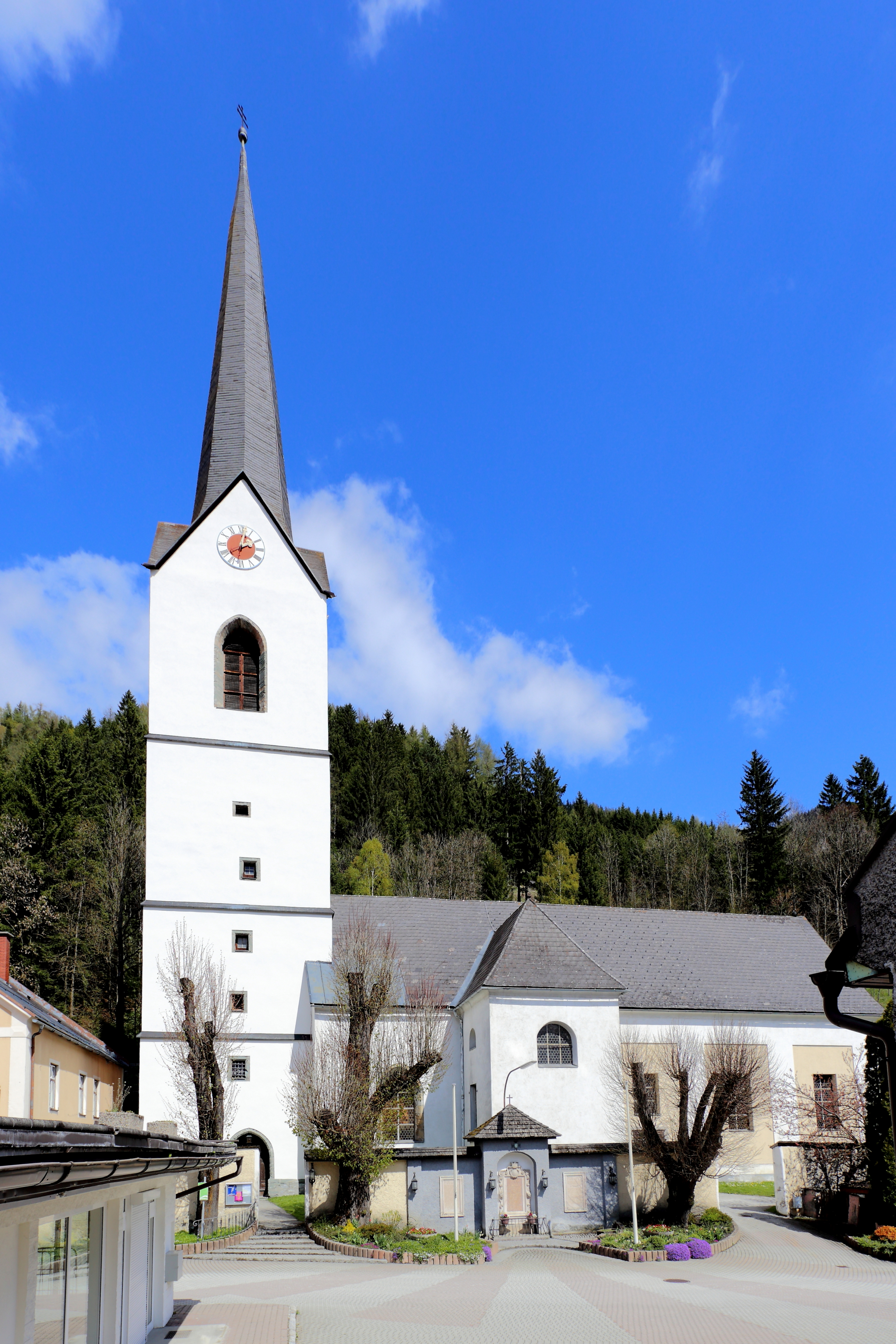 Südwestansicht der Ende des 16. Jahrhunderts errichteten katholischen Pfarrkirche hl. Oswald in der steiermärkischen Marktgemeinde Kalwang.